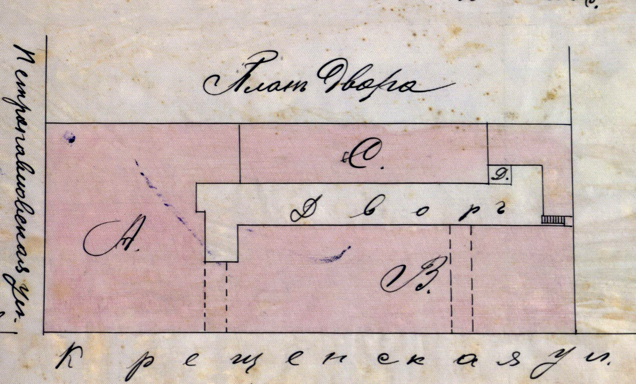 Беларуская (тарашкевіца): Менск (Miensk), вуліца Валоцкая (vulica Vałockaja). Камяніца Гейдукевічаў (Hiejdukievič)